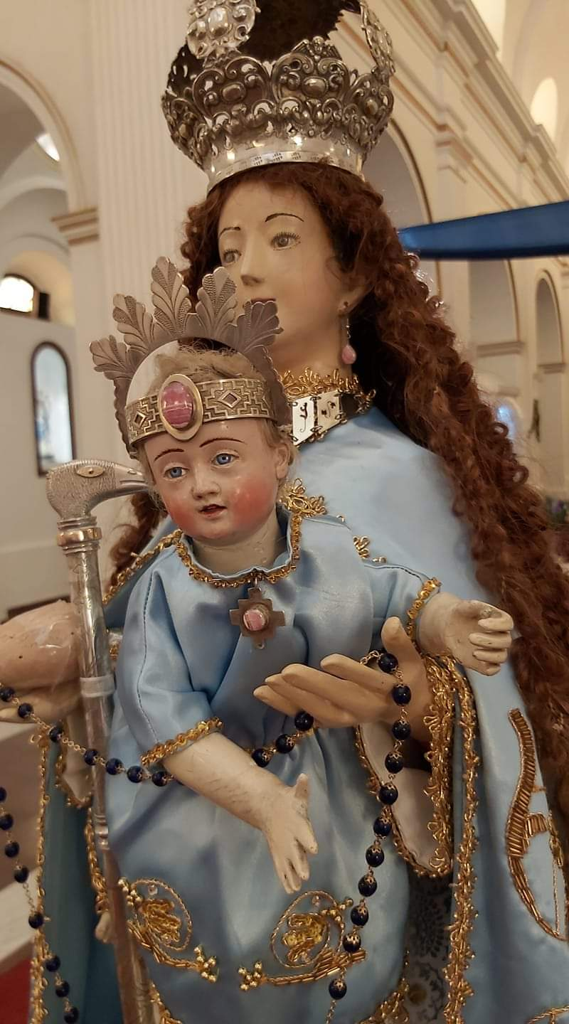 Virgen